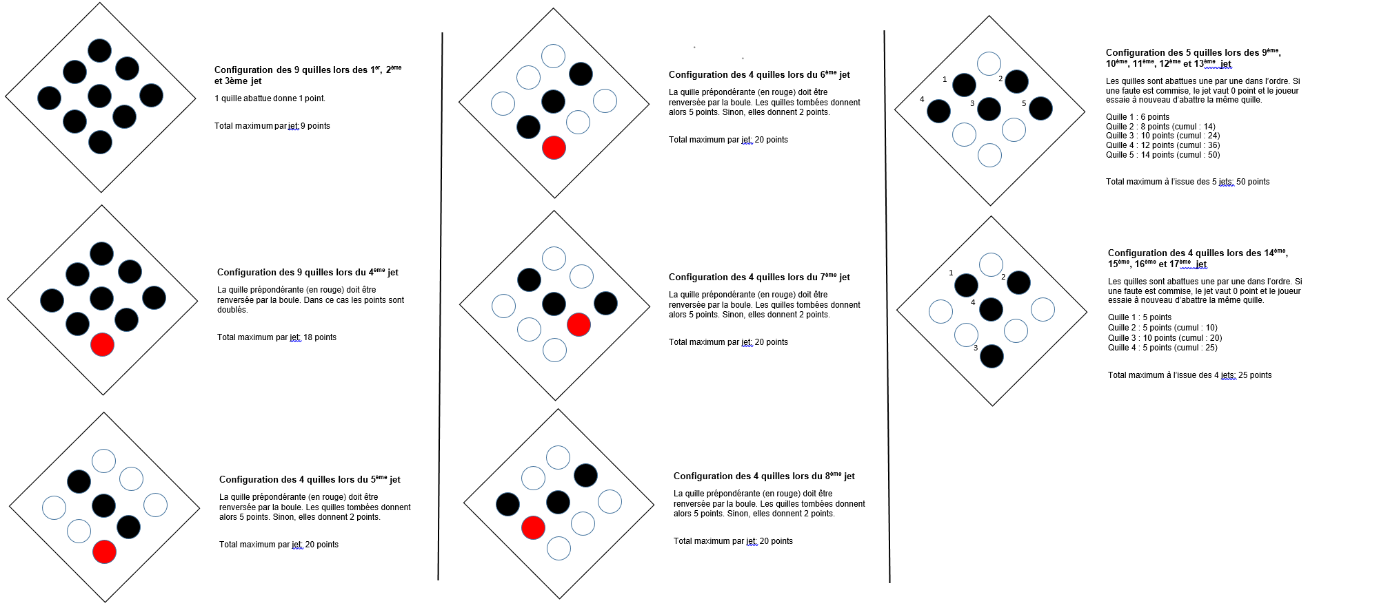 Schema emplacements quilles saint gall